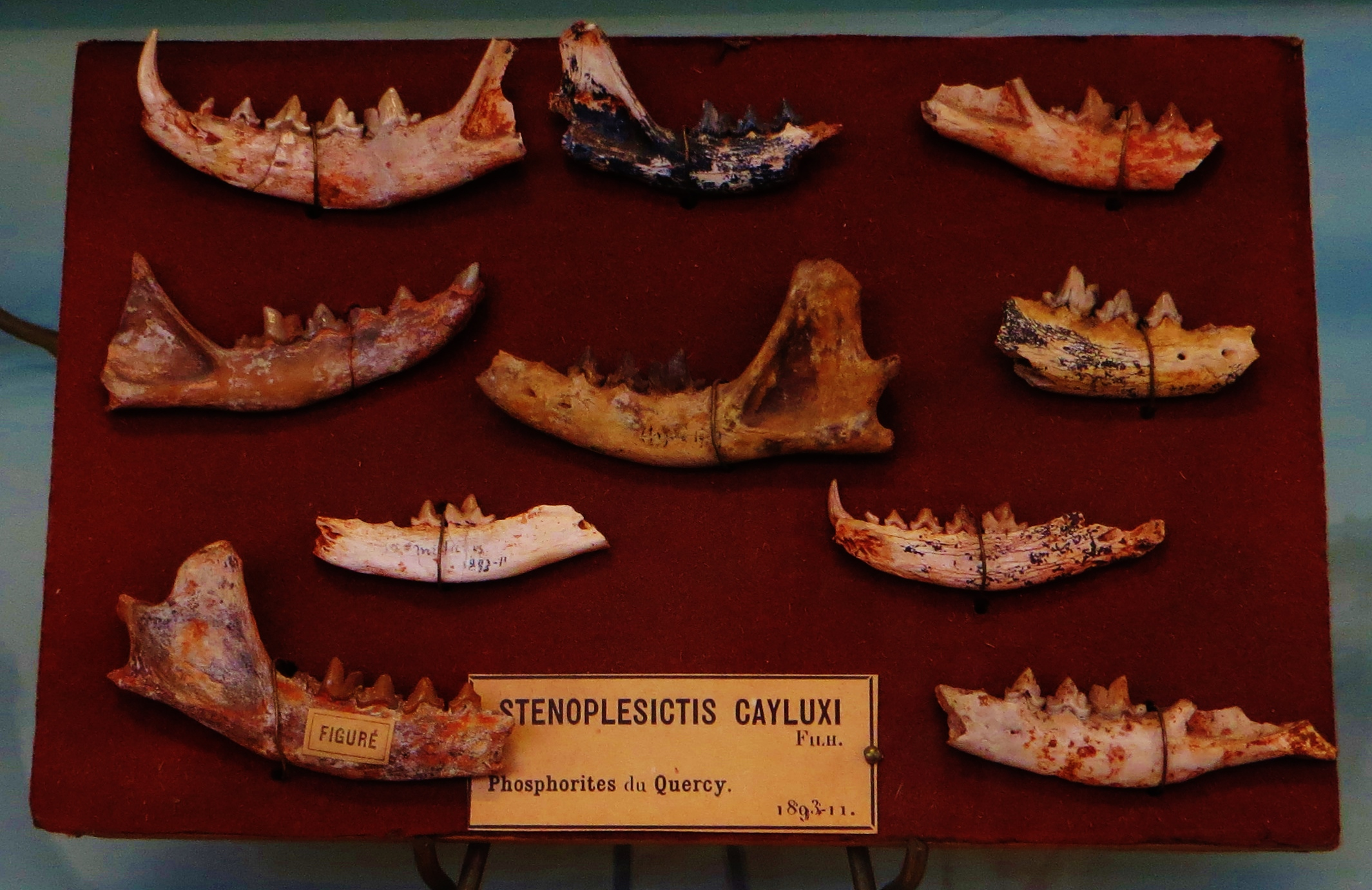 Fossil of Stenoplesictis, an extinct mammal- Took the photo at Musee d'Histoire Naturelle, Paris